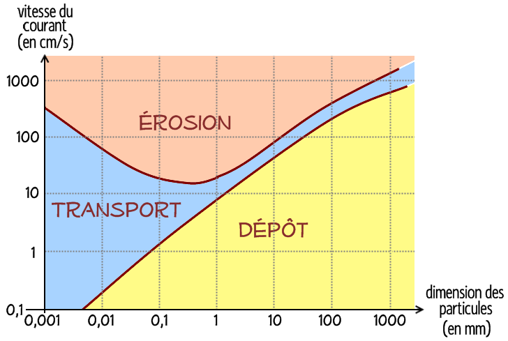 Diagramme de Hjulstrôm